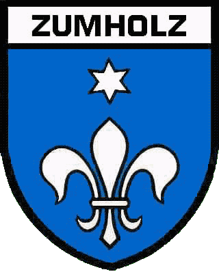 Wappen von Zumholz Kanton Freiburg Schweiz